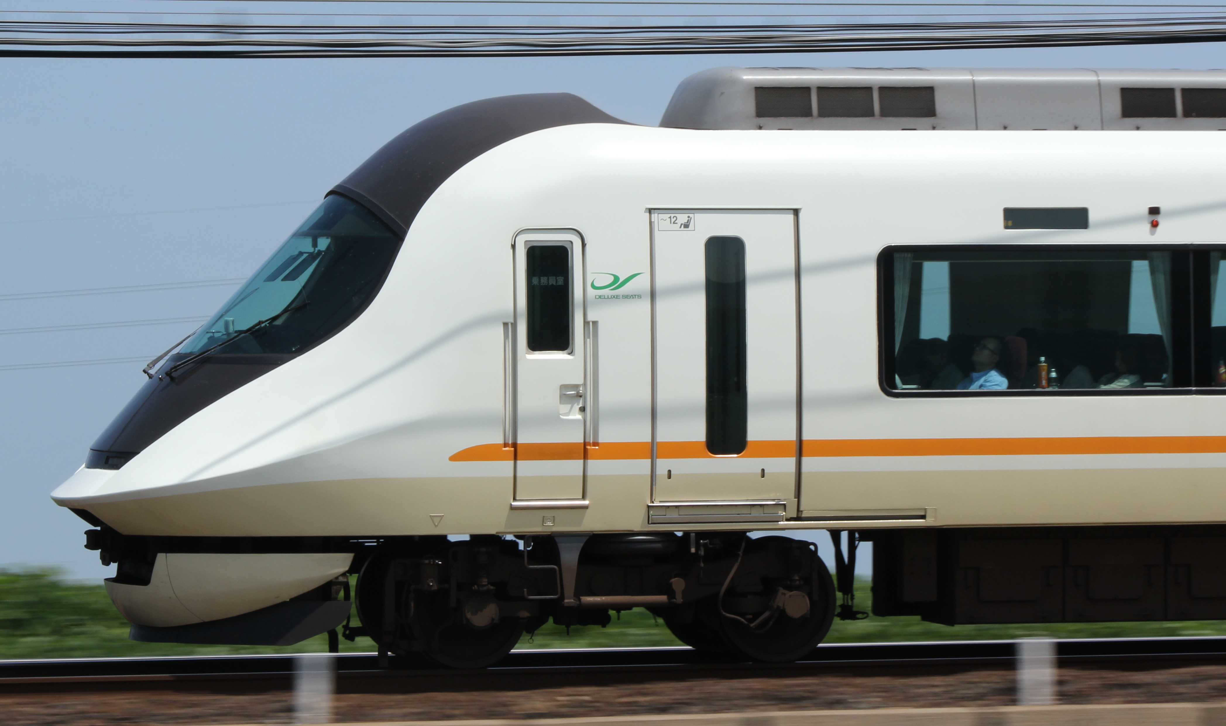 近鉄21020系サイドビュー 伊勢中川-桃園間